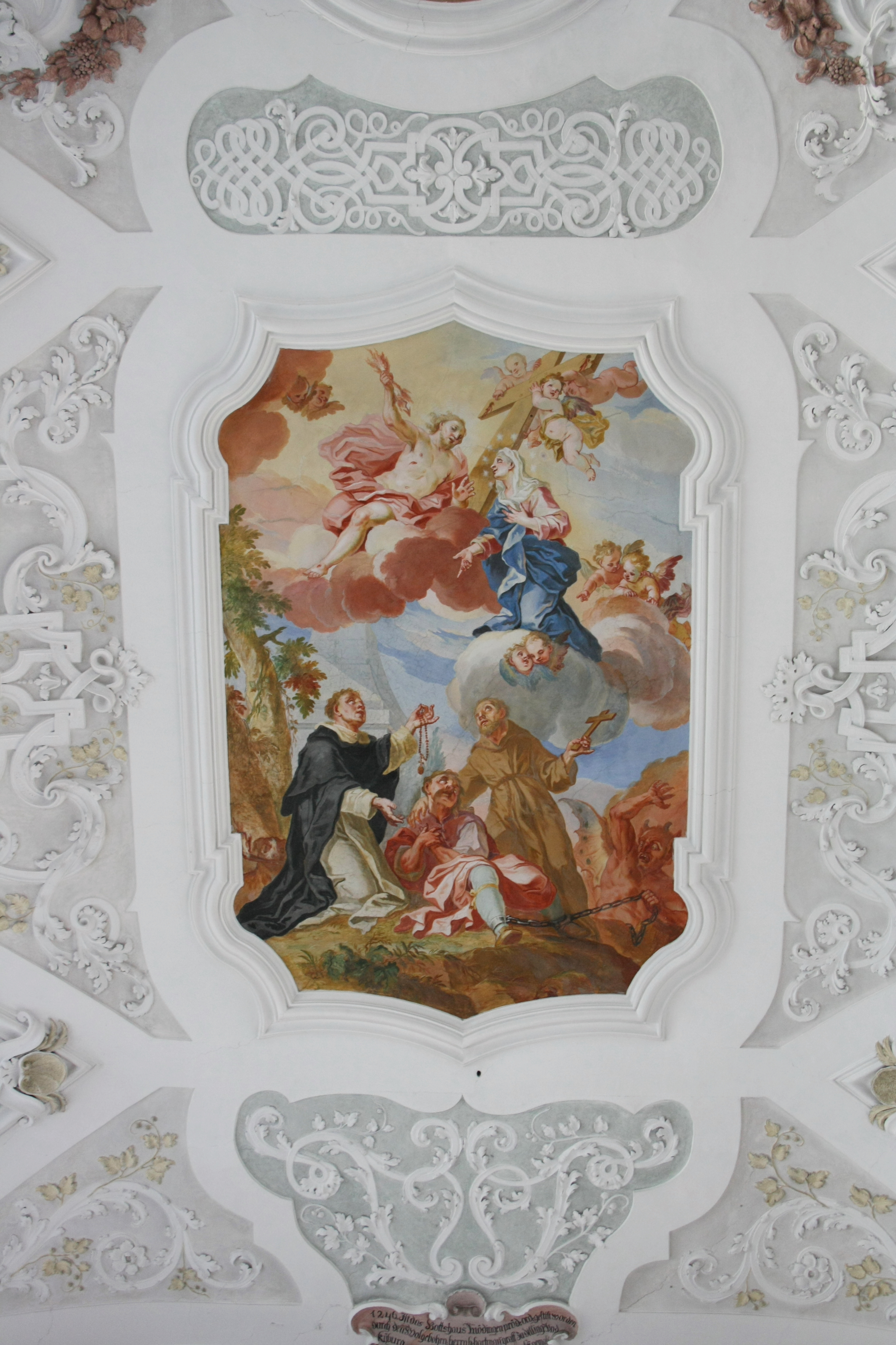 Klosterkirche Maria Medingen (Mariä Himmelfahrt) in Mödingen (Landkreis Dillingen an der Donau) des ehemaligen Dominikanerinnenklosters (heute Provinz Maria Medingen der Dillinger Franziskanerinnen), Deckenfresko des Langhauses von Johann Baptist Zimmermann, Darstellung der Ordensgründer Franz von Assisi und Dominikus, die einen vom Teufel gefesselten Sünder befreien